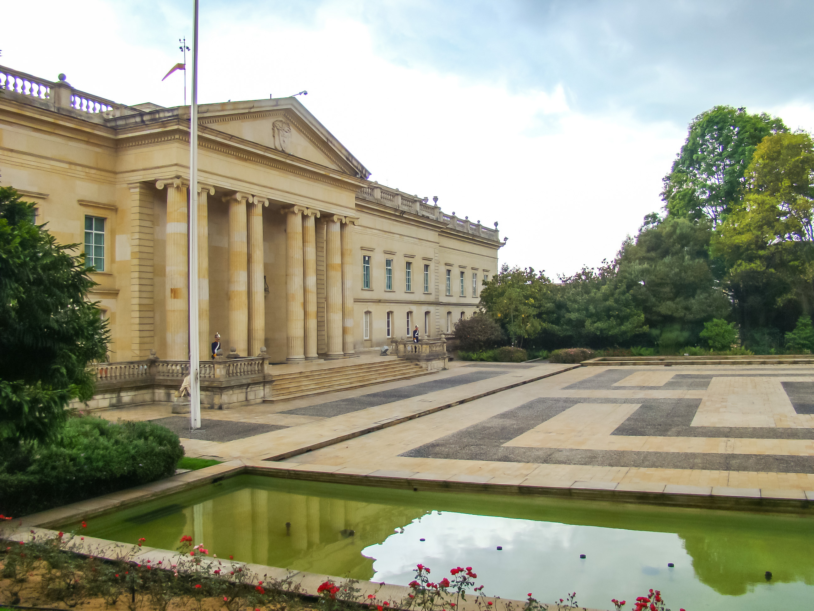 La Casa de Nariño